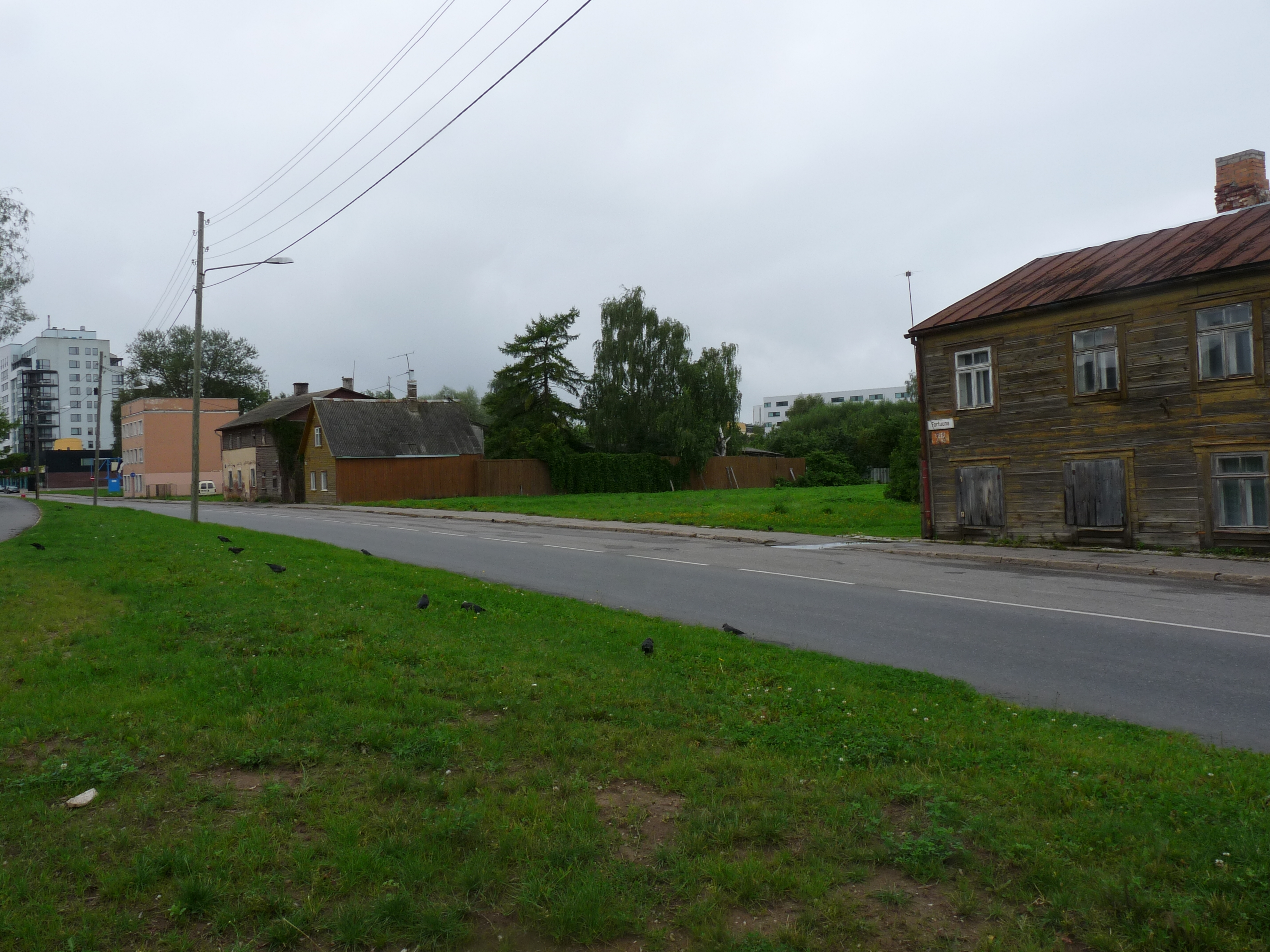 Fortuuna tänavat Tartus ilmestavad lammutatud hoonetest jäänud lüngad, 20. august 2012. Foto: Oop.